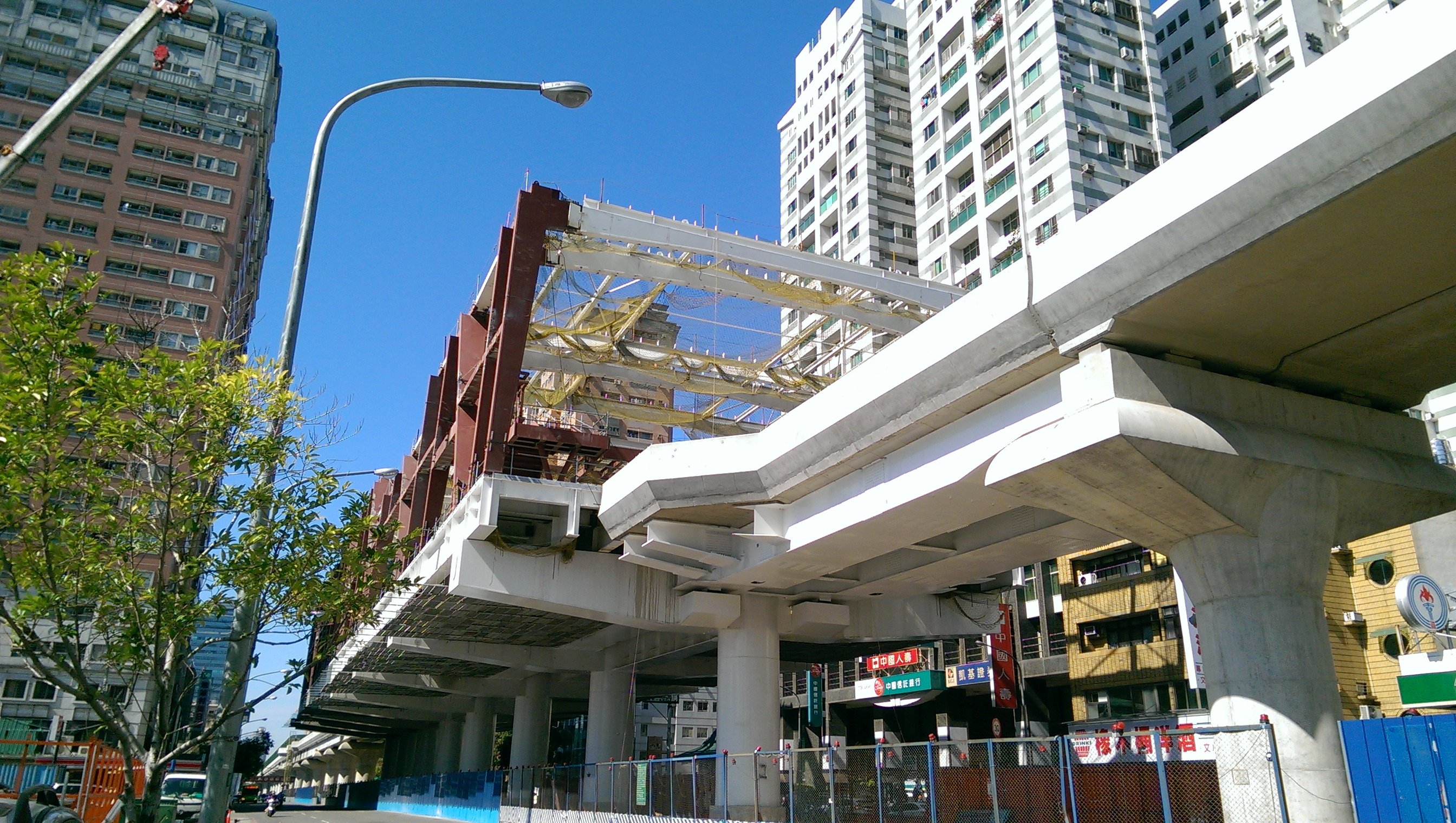 臺中捷運G5站2016年1月工程